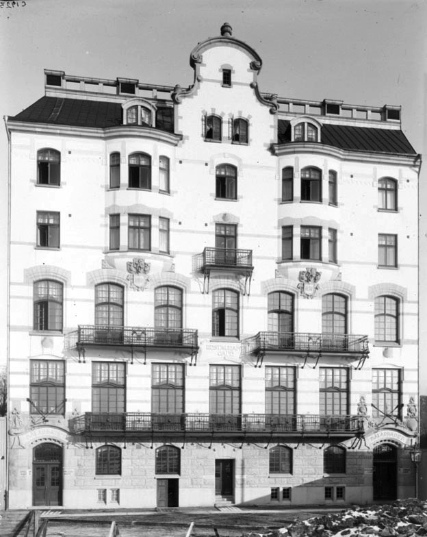 Mälarbadet vid Norr Mälarstrand 12. Tid: 1906 - 1917 Referenser Upphov: Okänd. Tid: 1906 - 1917 Beteckning: Fotonummer C 1923